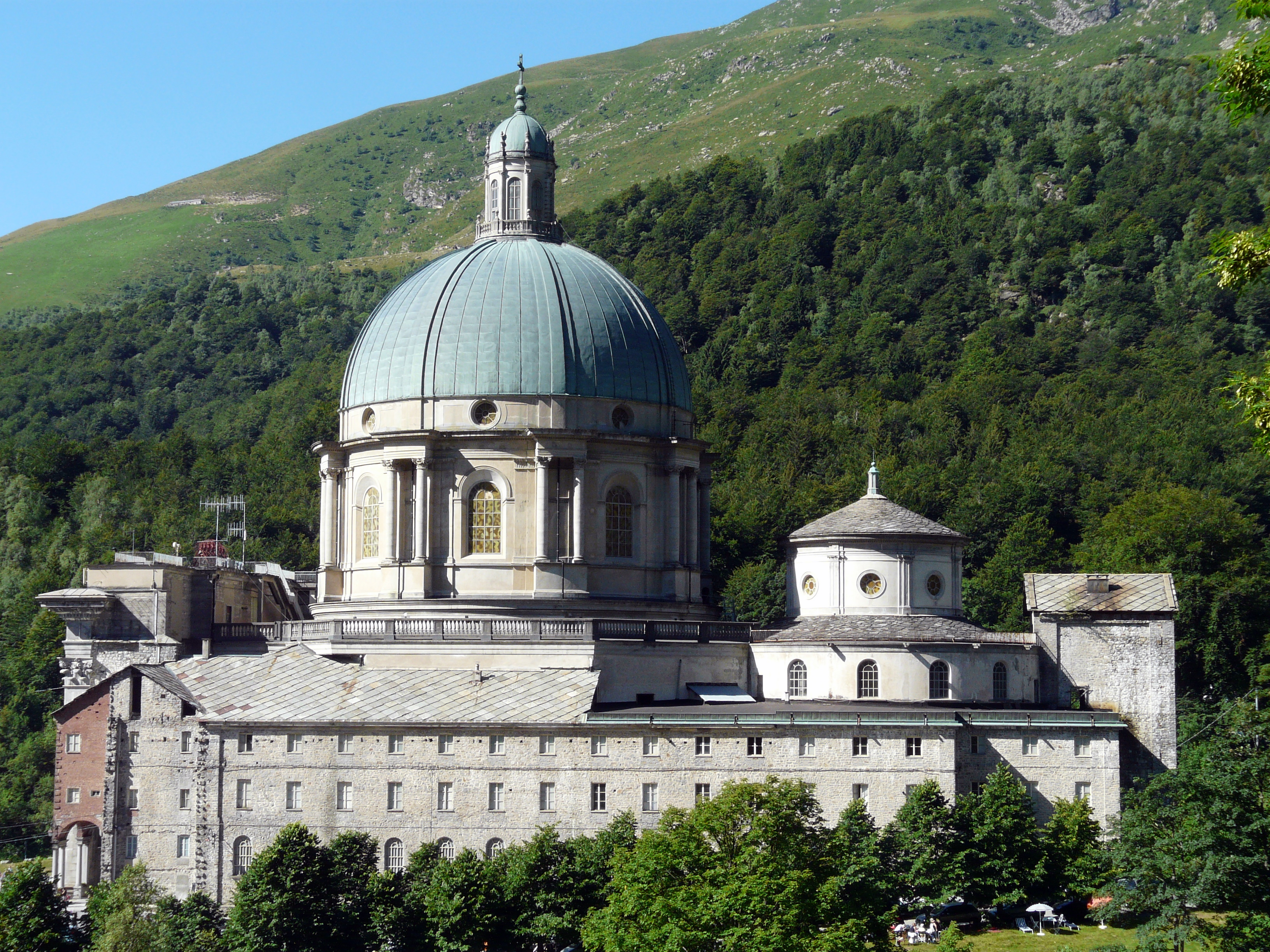 Serie di immagini del Santuario di Oropa, Piemonte, Italia